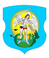 Herb miasta Szumilino